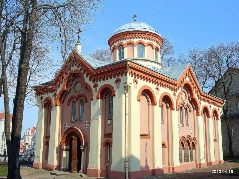 Пятницкая церковь